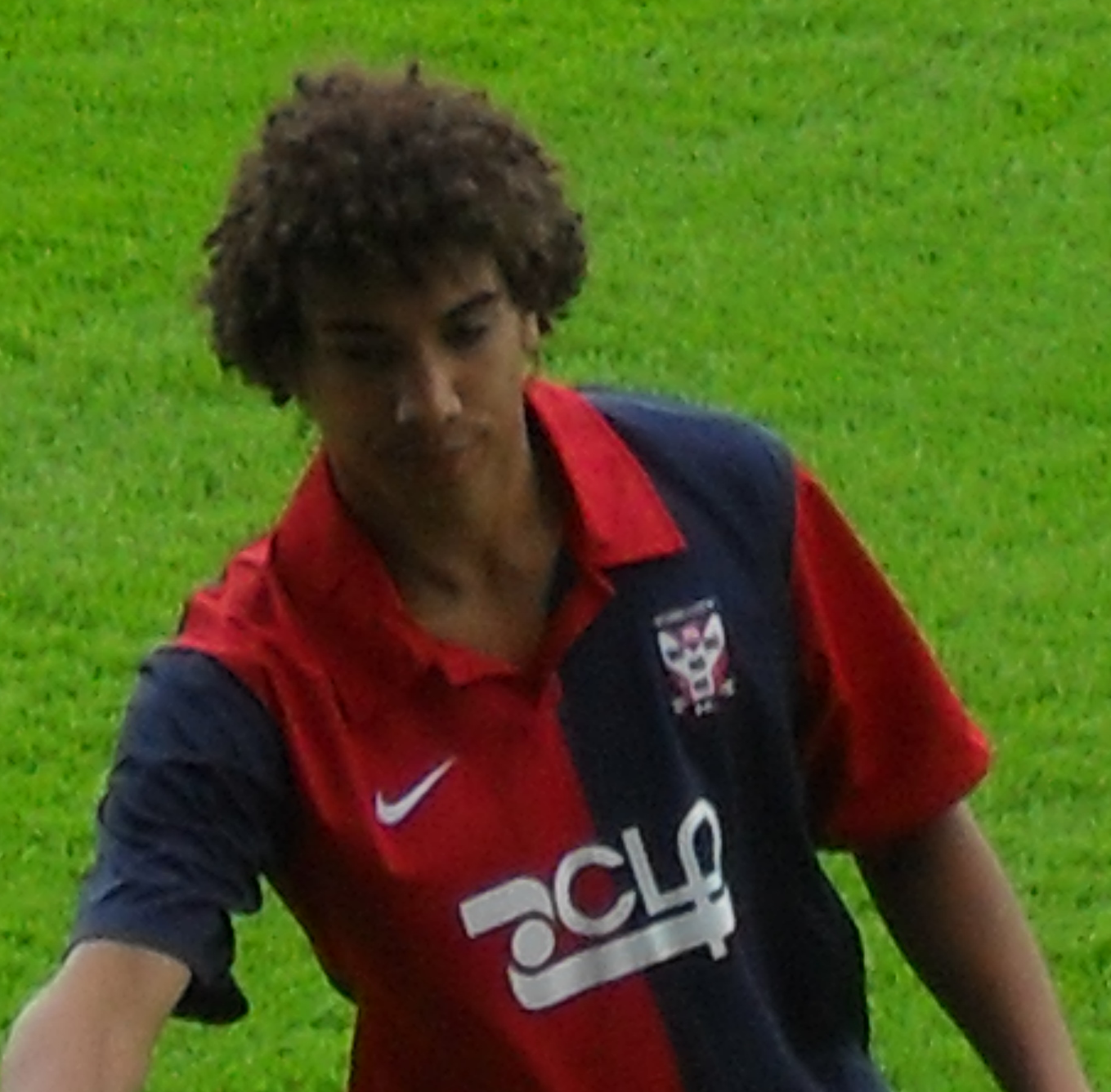 Jamie Jackson